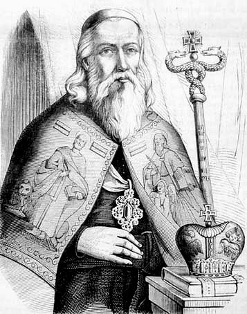 Bacsinszky András (1732–1809) görög katolikus püspök (Vasárnapi Ujság, 1859. január 16.)